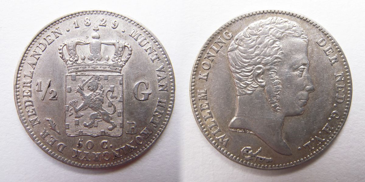 Halve gulden van het Koninkrijk der Nederlanden, 1829, zilver, geslagen te Brussel.